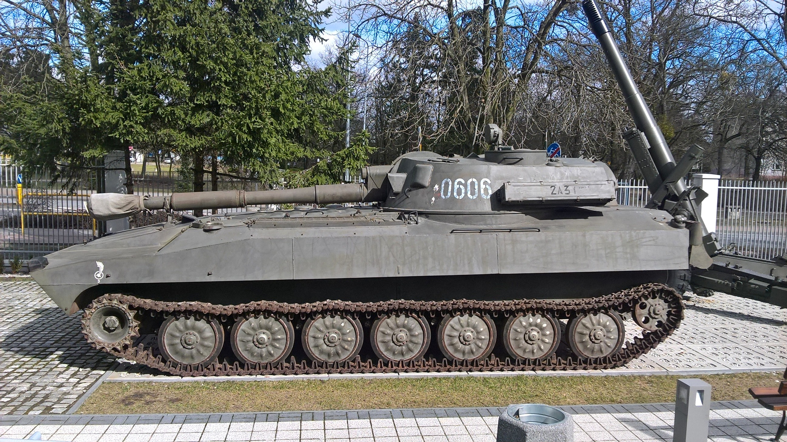 2S1 Goździk w Muzeum Wojsk Lądowych w Bydgoszczy